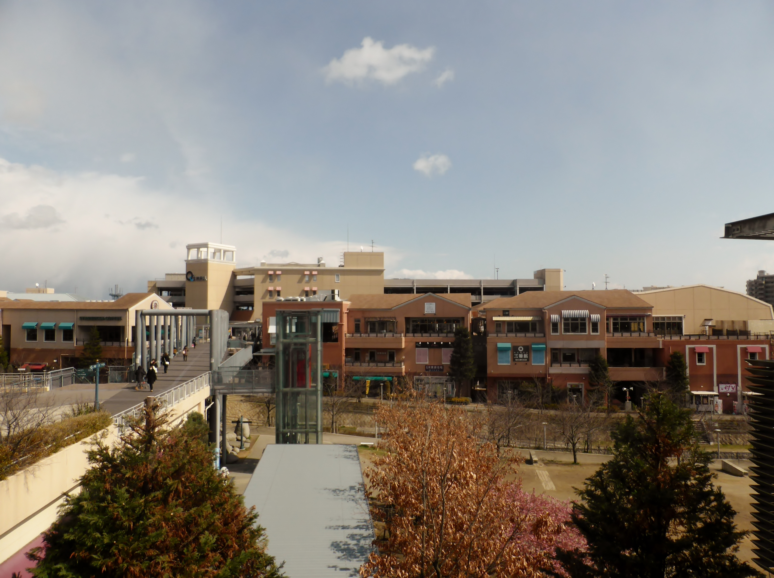 みのおキューズモールを撮影。